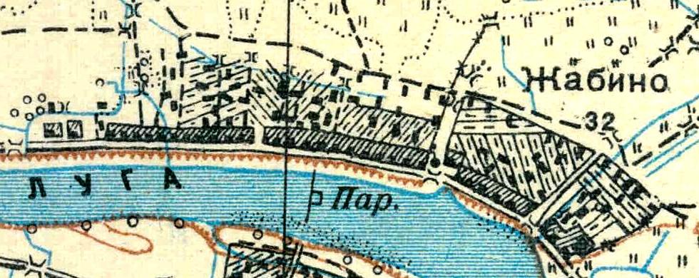 Топографическая карта Ленинградской области, квадрат О-35-21-Г-б (Калмотка), деревня Жабино.